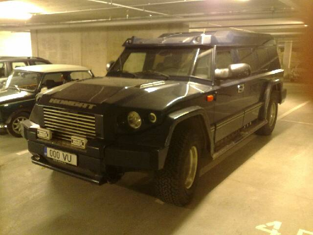 Dartz Kombat, made in Latvia